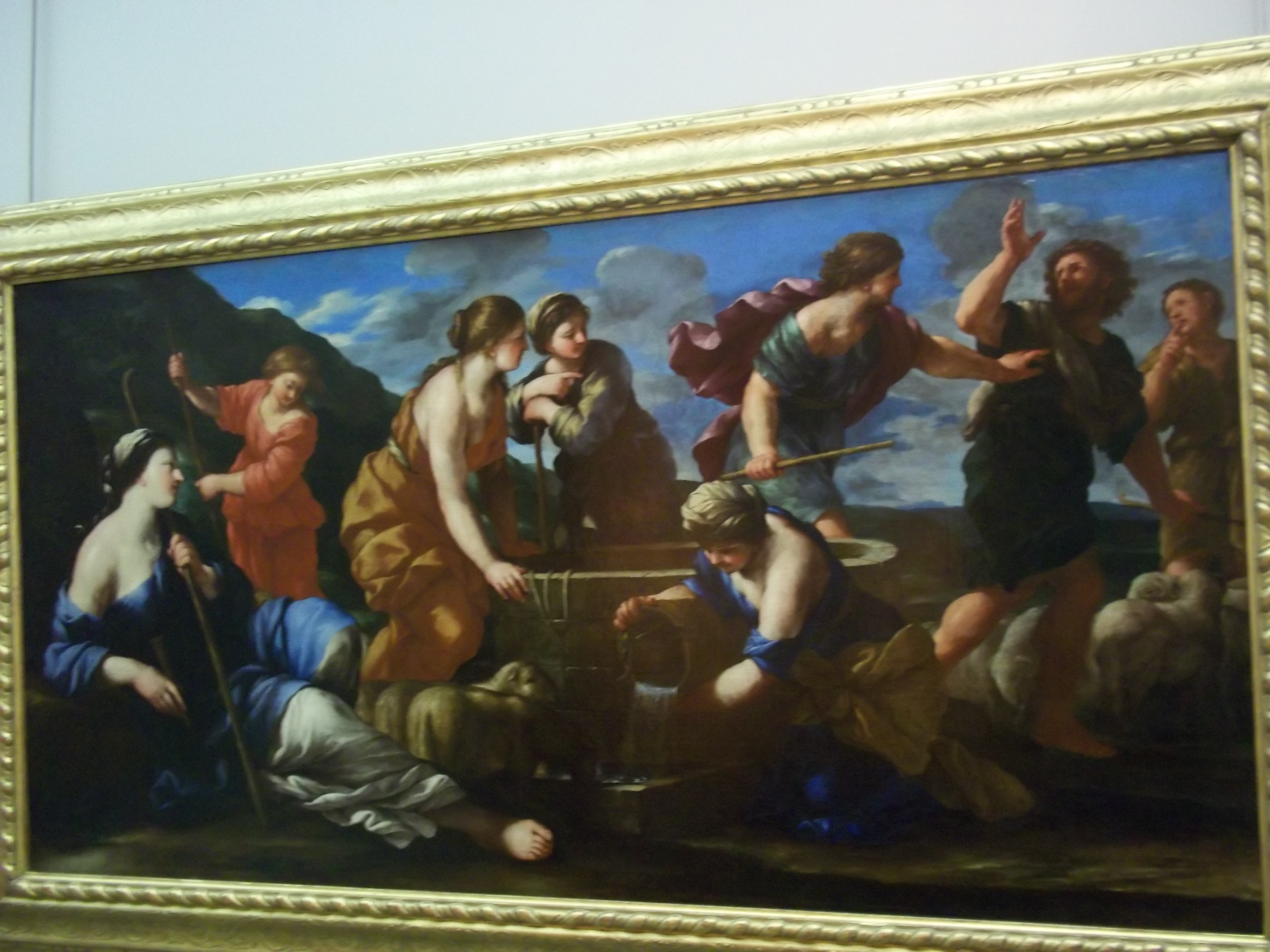 Moïse et les filles Jethro